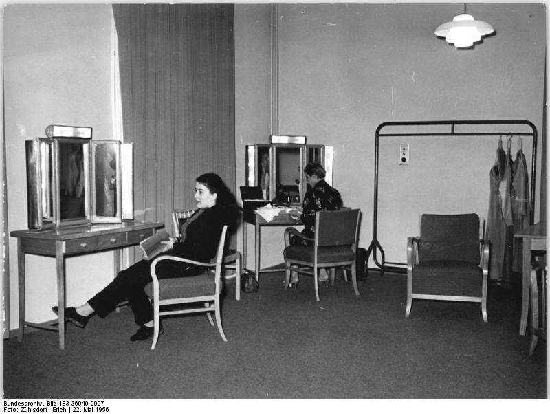 Zentralbild Zühlsdorf 22.3.1956 Vom Umbau des Deutschen Theaters in Berlin. Der erste Abschnitt des Umbaus des Deutschen Theaters Berlin ist mit der Fertigstellung des Garderobenflügels, der nach modernsten Gesichtspunkten eingerichtet ist, fertiggestellt. UBz: (links) Christa Pasemann und Felicitas Wenck (rechts) in einer Garderobe des neuen Garderobenhauses vor ihrem Auftritt in "Legende der Liebe" von Nazim Hikmet.